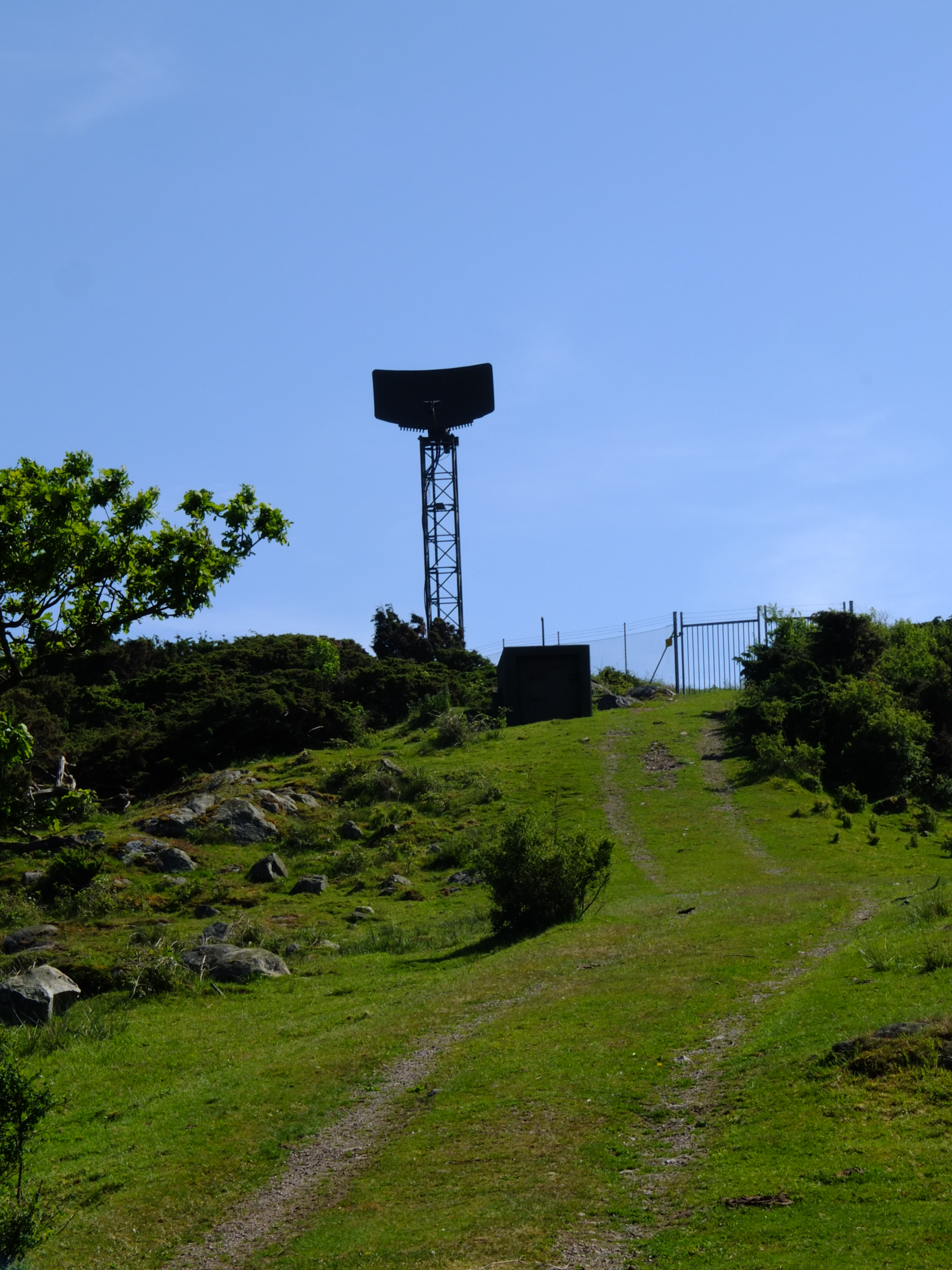 Radarstation av typ PA-31 i Sverige